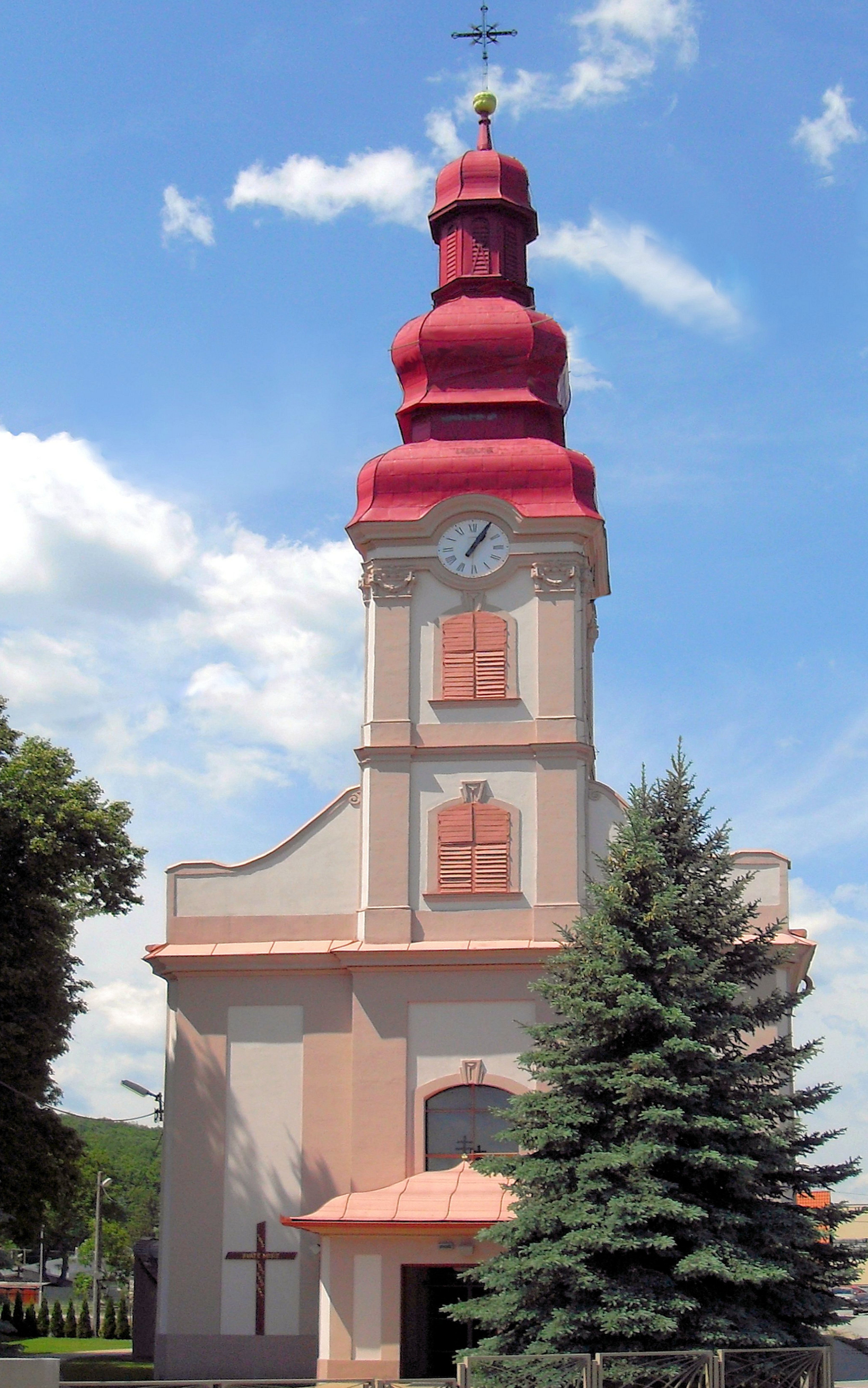 Košice-Myslava, Rímskokatolícky kostol Svätého Bartolomeja